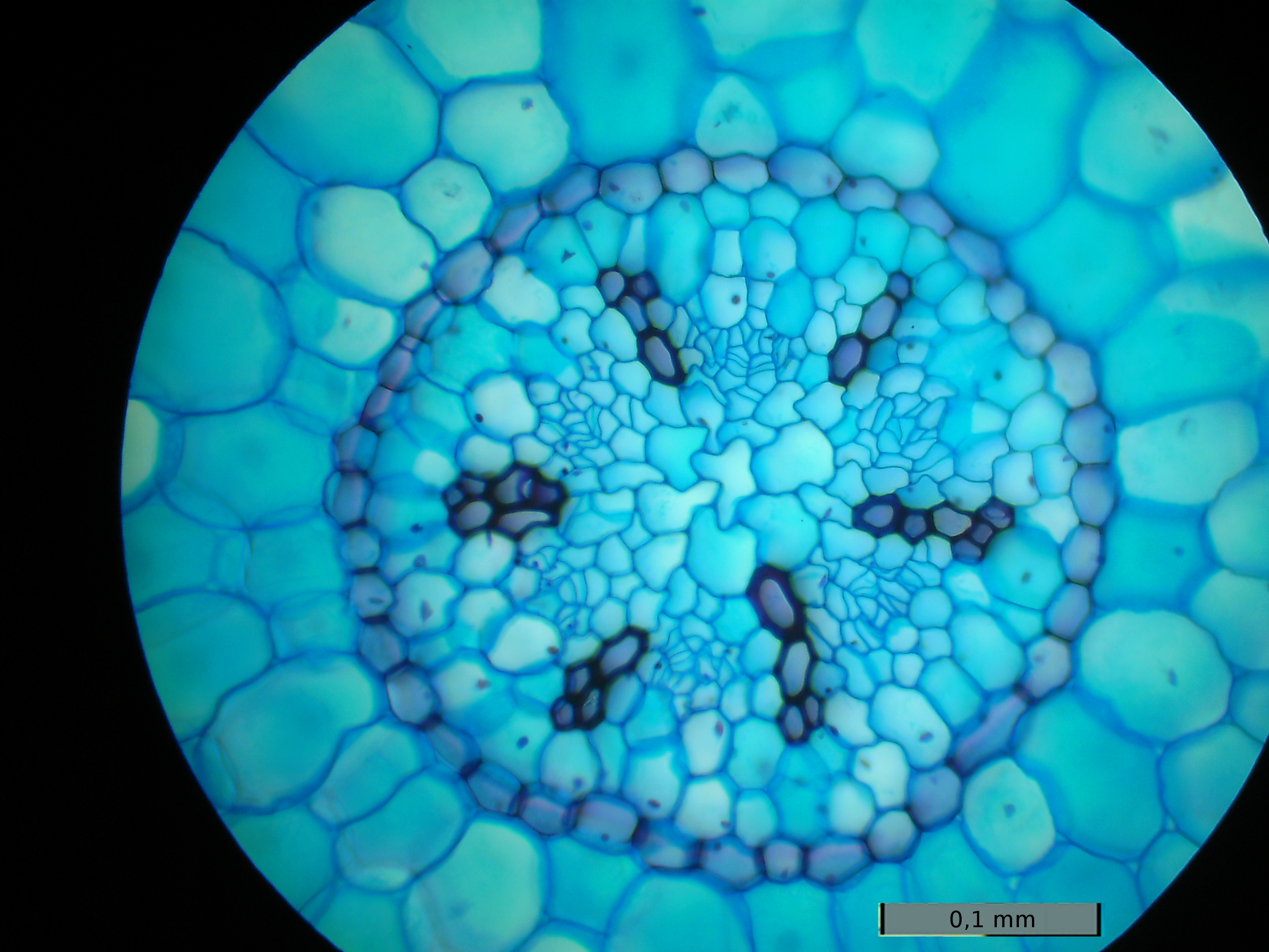 Querschnitt durch Wurzelknolle des Scharbockskrautes; Detailansicht des Zentralzylinders; Fixierung: Ethanol, Essigsäure, Formaldehyd; Färbung: Astrablau Chrysoidin Fuchsin nach Etzold (Zellulosezellwände blau, lignifizierte Zellwände rot; Vergrößerung: 200fach. Der Zentralzylinder ist der Bereich innerhalb der rot gefärbten sekundären Endodermis. Er weist 6 rot gefärbte Xylempole auf, dazwischen Phloem in blau. Um den Zentralzylinder herum beginnt sich das großzellige Speichergewebe zu differenzieren.